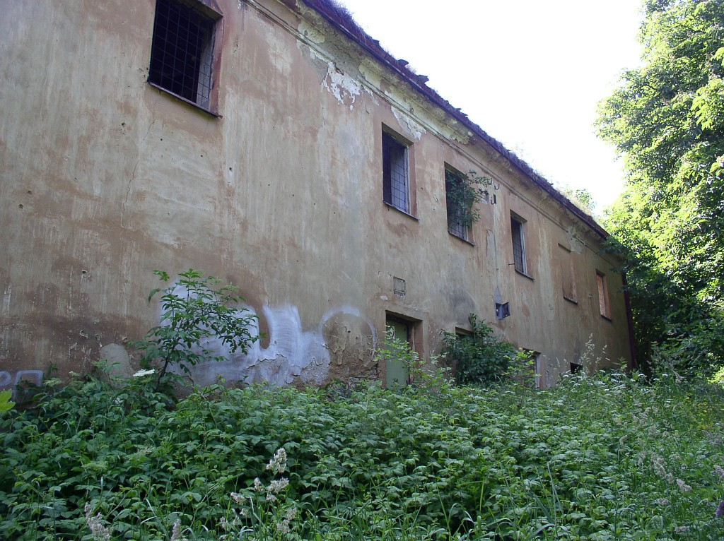 Usedlost Skalka v Praze na Smíchově